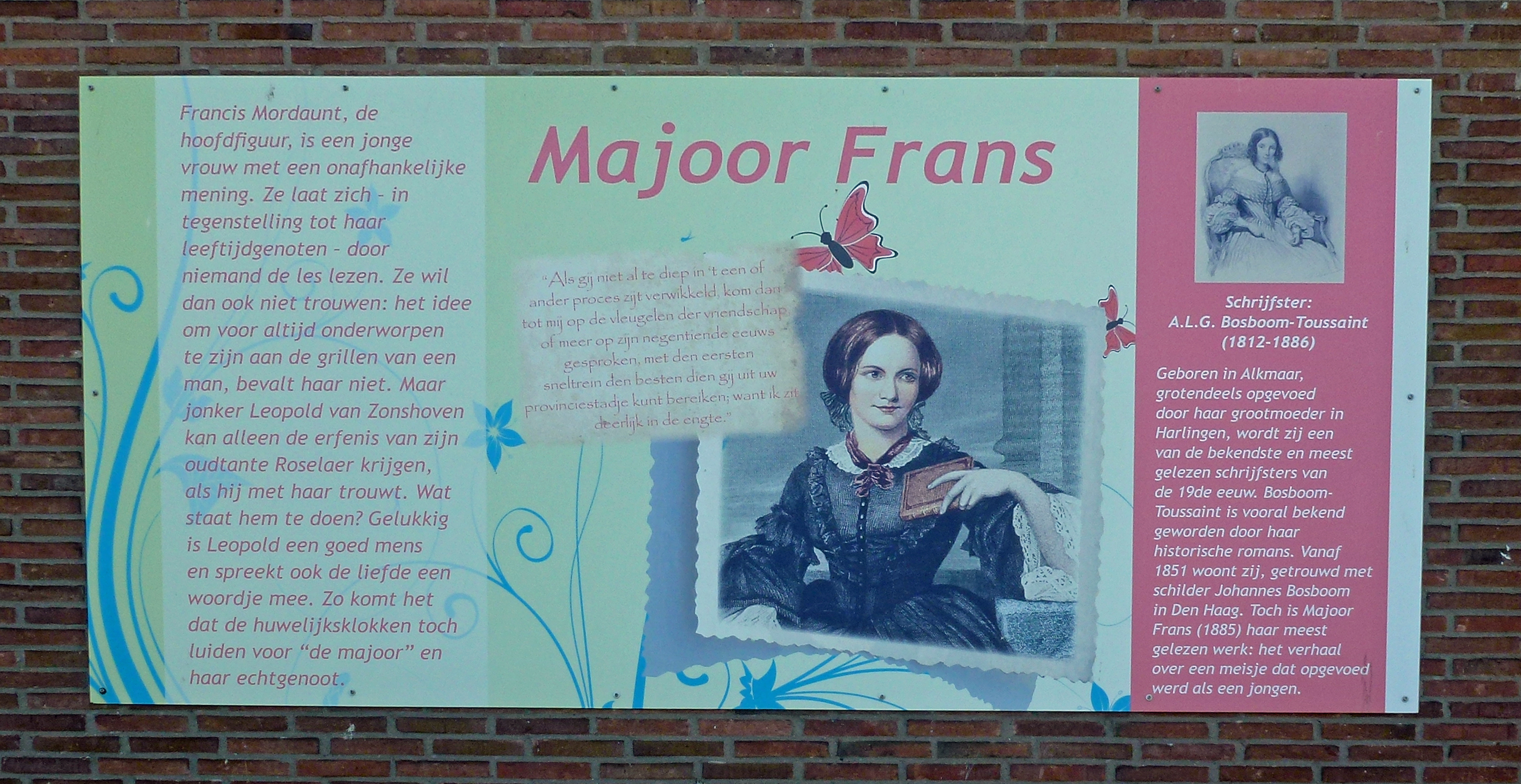 Straatnaam beschrijving. Majoor Frans is geschreven door schrijfster Anna Louisa Geertruida Bosboom-Toussaint